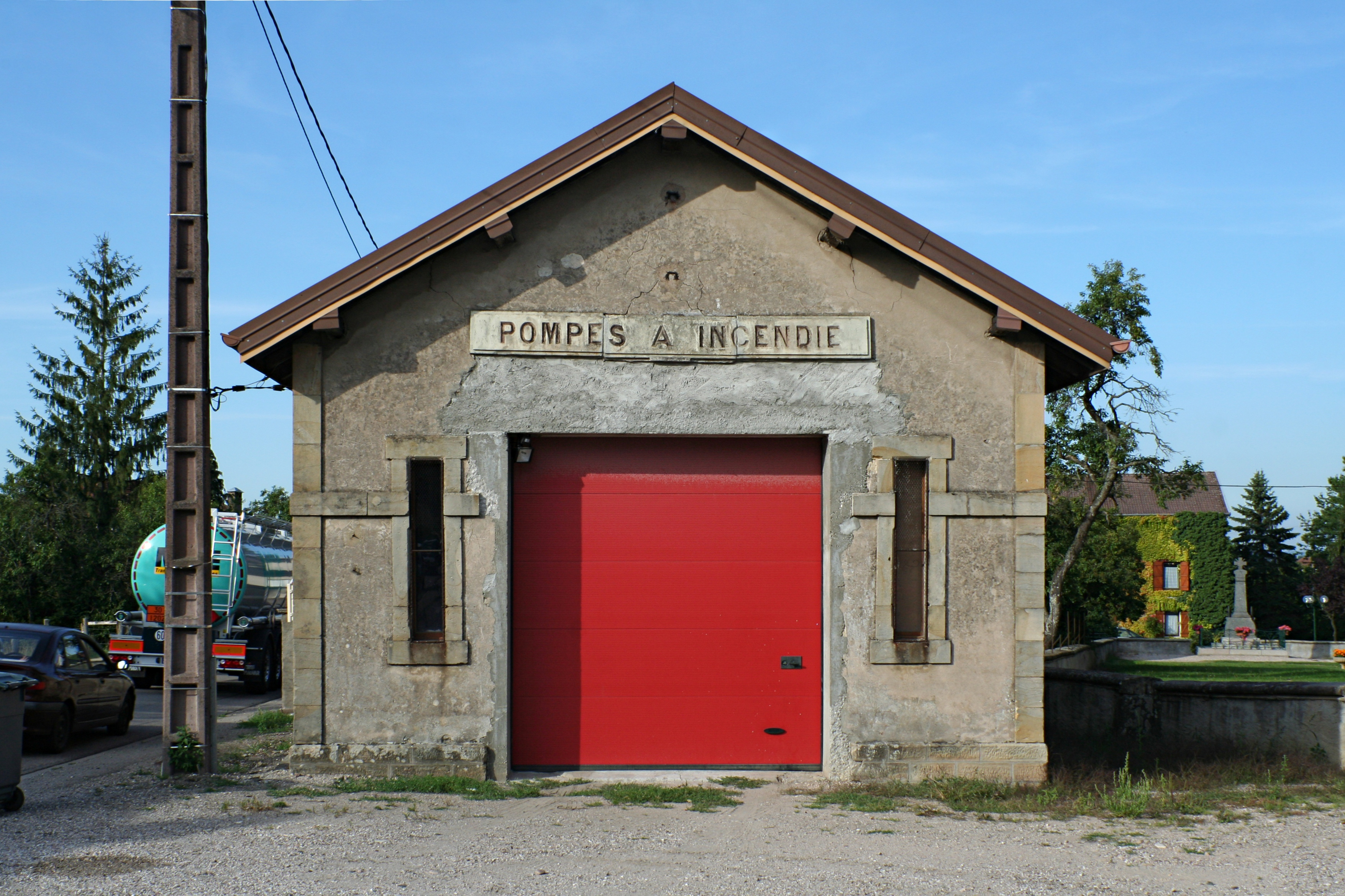 Salle des pompes de Padoux (Vosges)